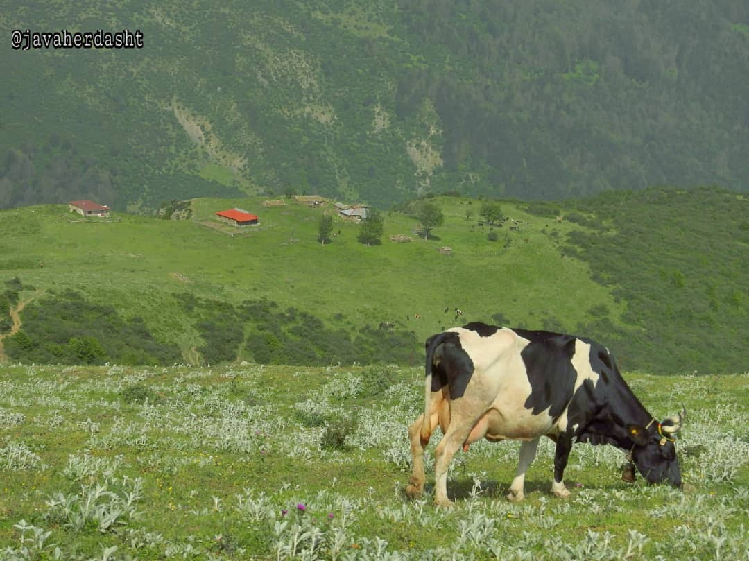 javaherdasht